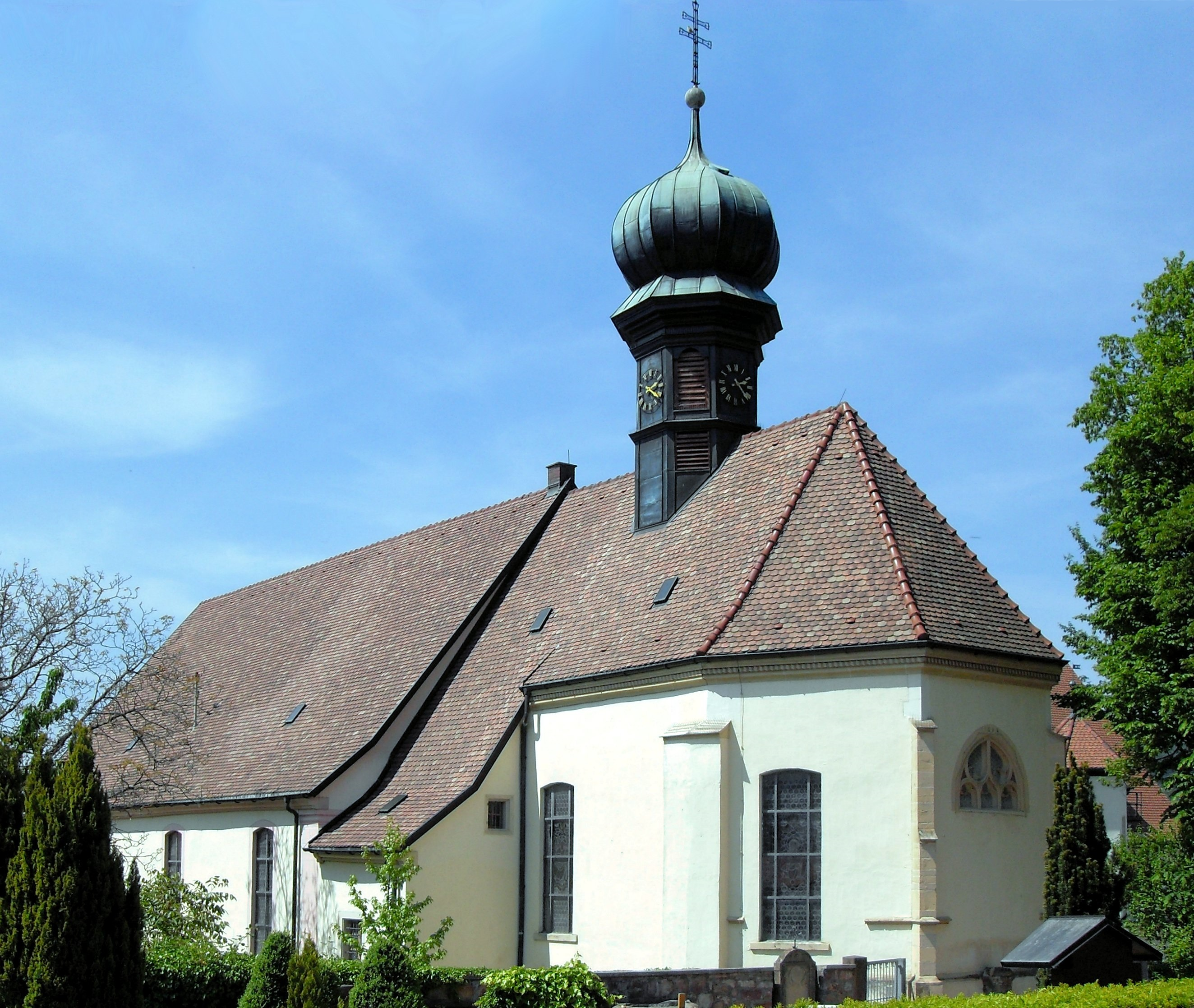 Klosterkirche St.Fides und Markus in Sölden